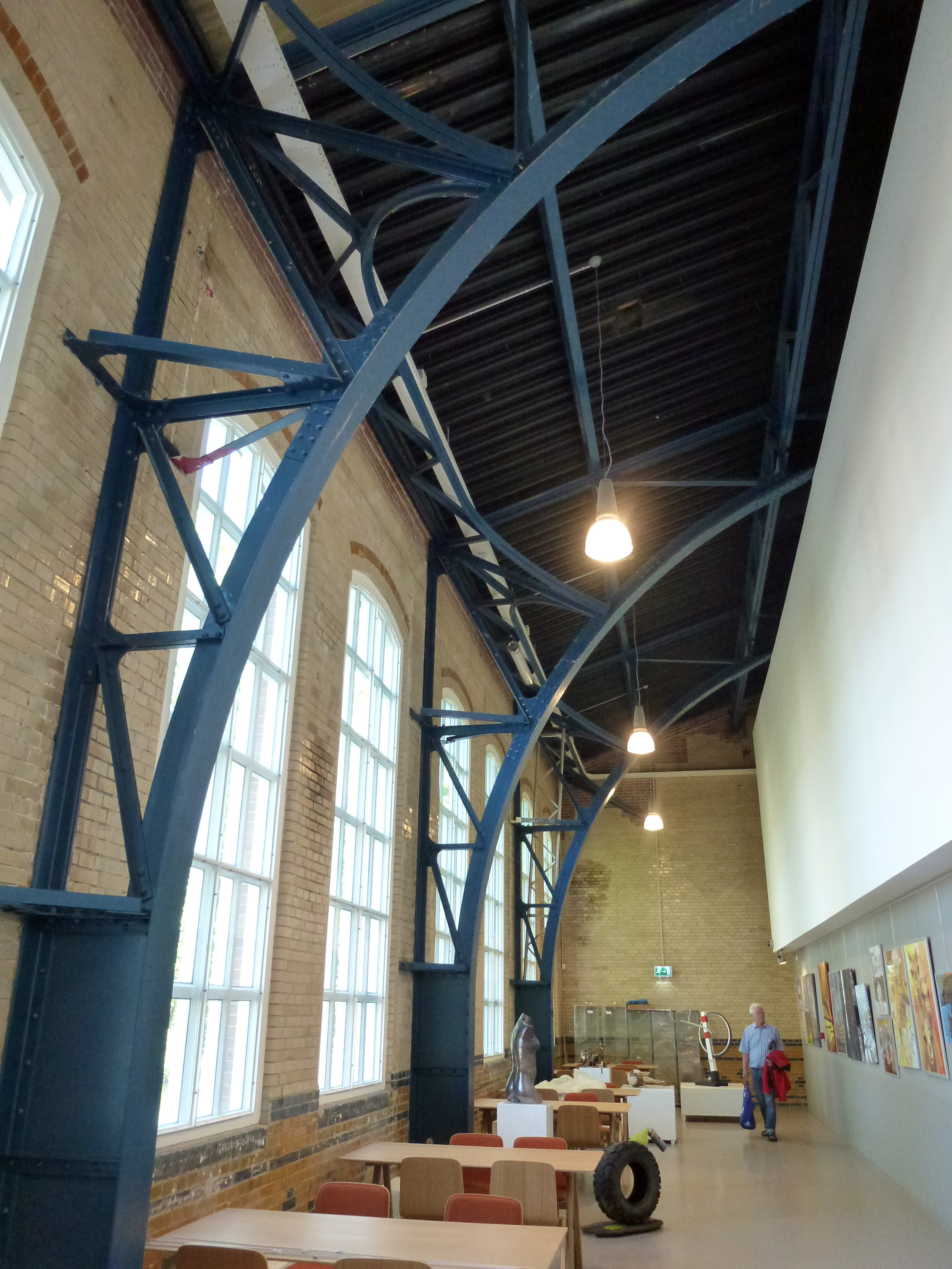 In mei 2014 werd de verbouwde Garenspinnerij aan de Turfsingel 31-34, opengesteld voor belangstellenden. Van het oude interieur zijn alleen de ijzeren constructie en de geglazuurde wandtegels bewaard gebleven